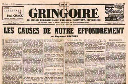 Une du journal hebdomadaire Gringoire